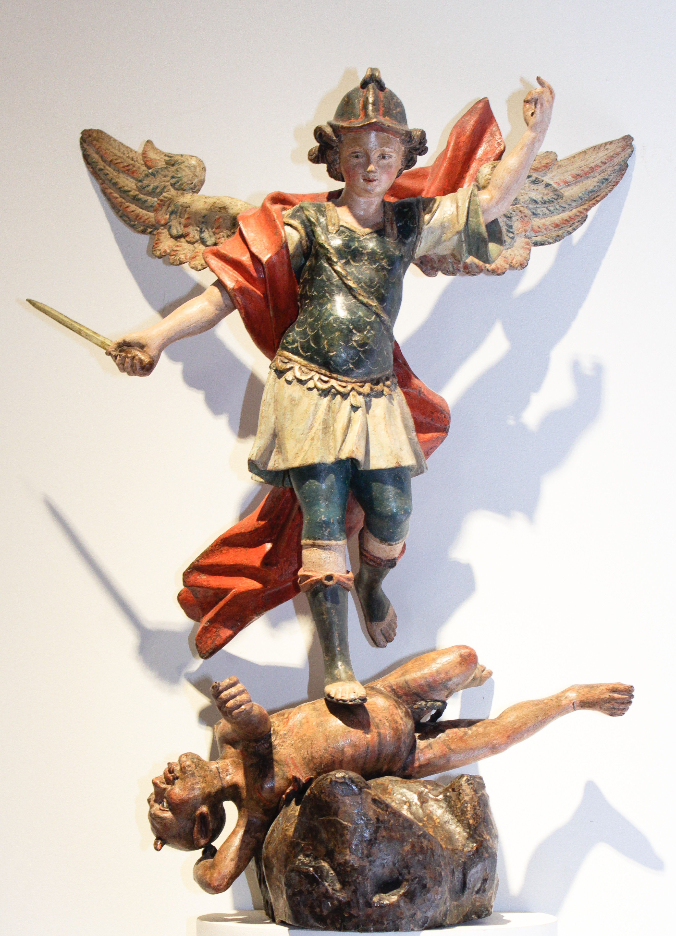 San Miguel Arcángel, obra de madera policromada con ojos "de cascarón" (vidrio pintado por detrás). De origen español, siglo XVIII. Era el santo patrono del Fuerte de Buenos Aires, que por esa razón se denominaba "Castillo de San Miguel". Representado como un ángel guerrero, San Miguel aplasta con su pie al demonio, amenazándole con su espada. Se trata de una pieza de muy buena manufactura, tanto por su realización artesanal como por la plasticidad que exhiben los personajes.